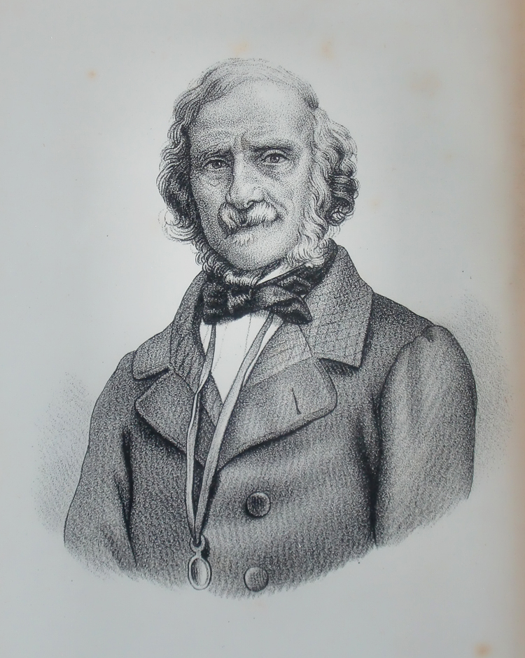 Terenzio Mamiani della Rovere (Pesaro, 19 settembre 1799 – Roma, 21 maggio 1885), filosofo, politico e scrittore italiano.